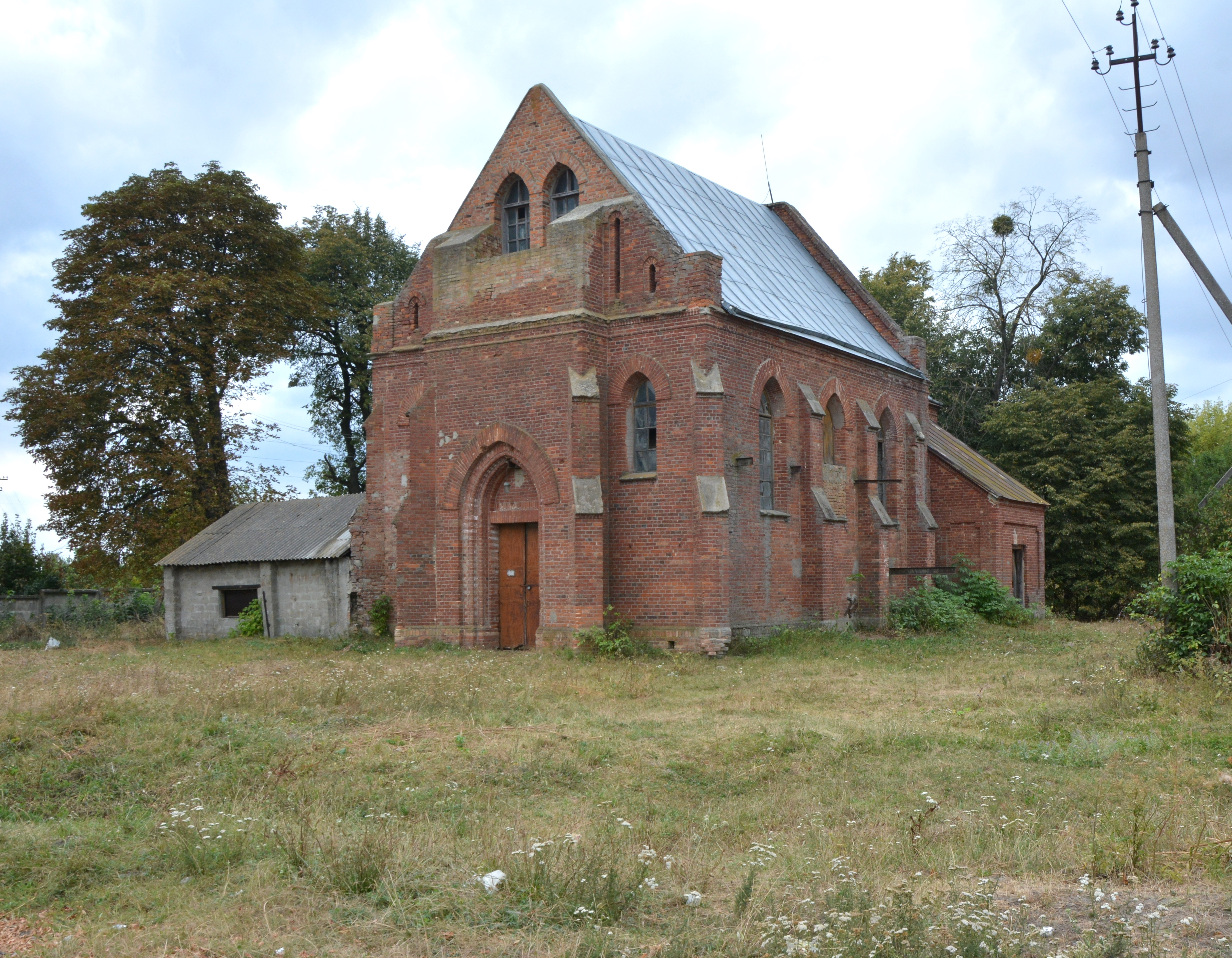 Костел (мур.), Купичів